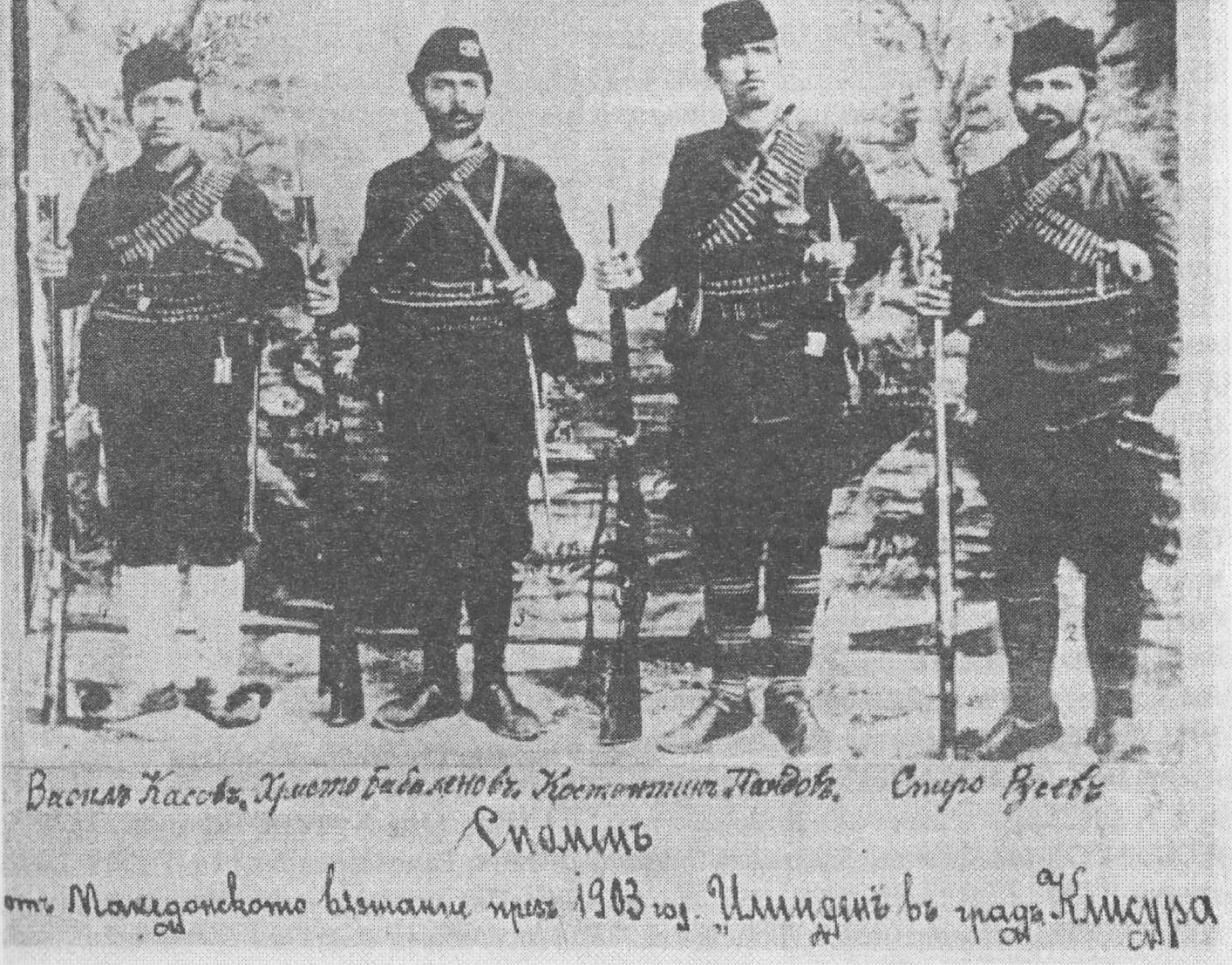 Васил Касов, Христо Бабаленов, Константин Пандов, Спиро Русев.